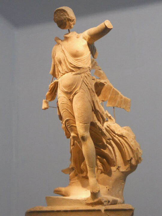 Olympia Museum